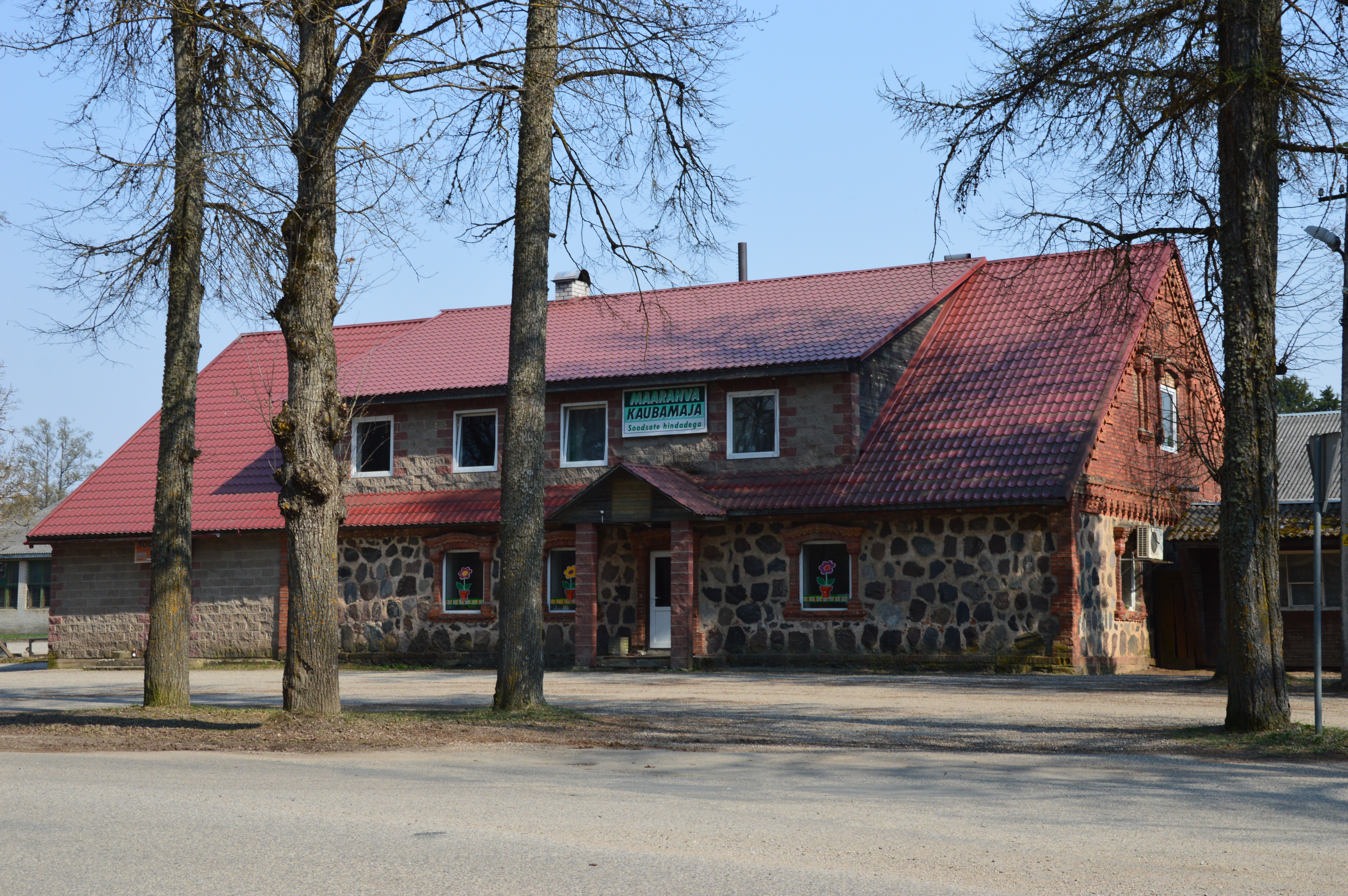 Maarahva kaubamaja Tsoorus